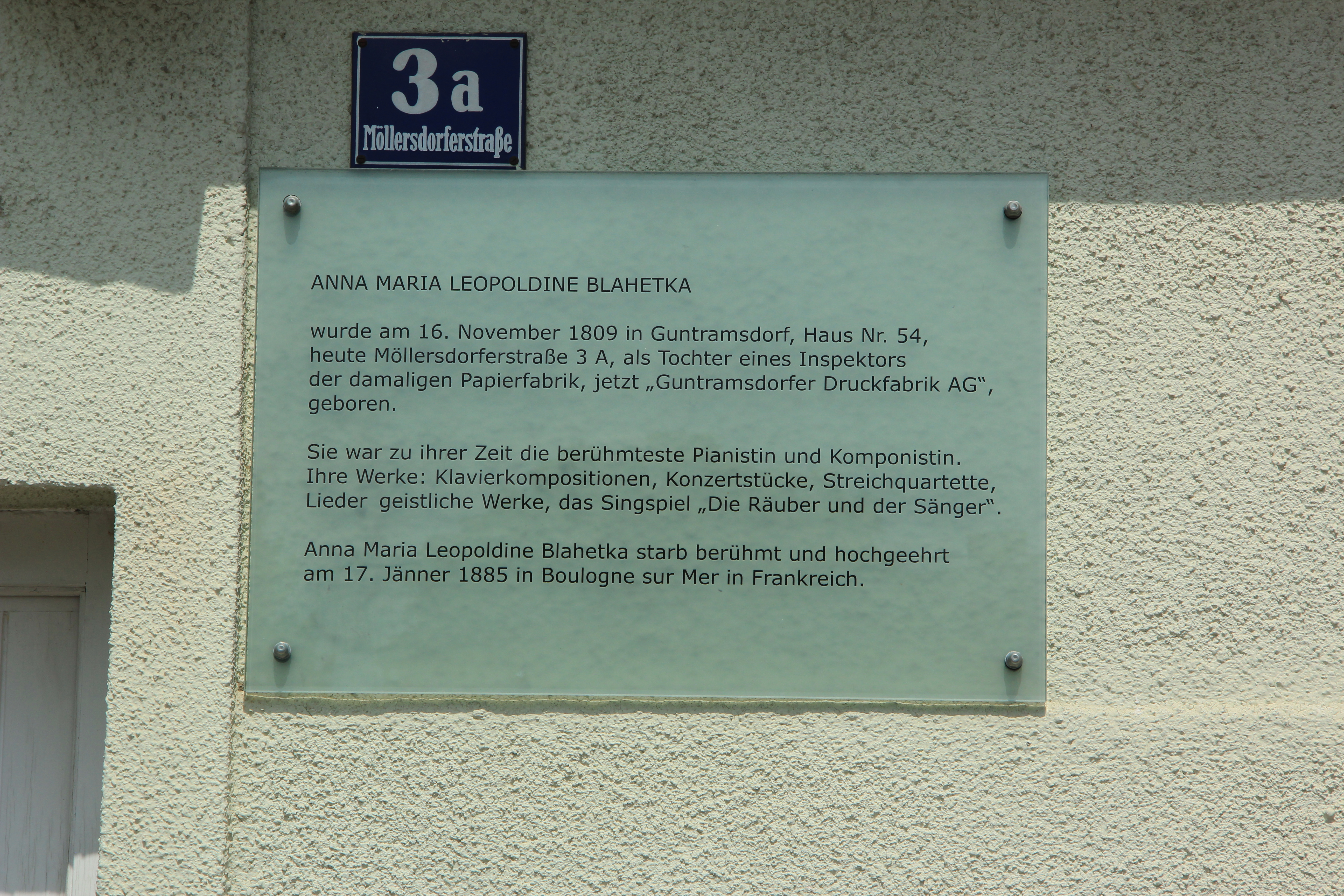 Erinnerungstafel am Geburtshaus von Anna Maria Leopoldine Blahetka in Guntramsdorf